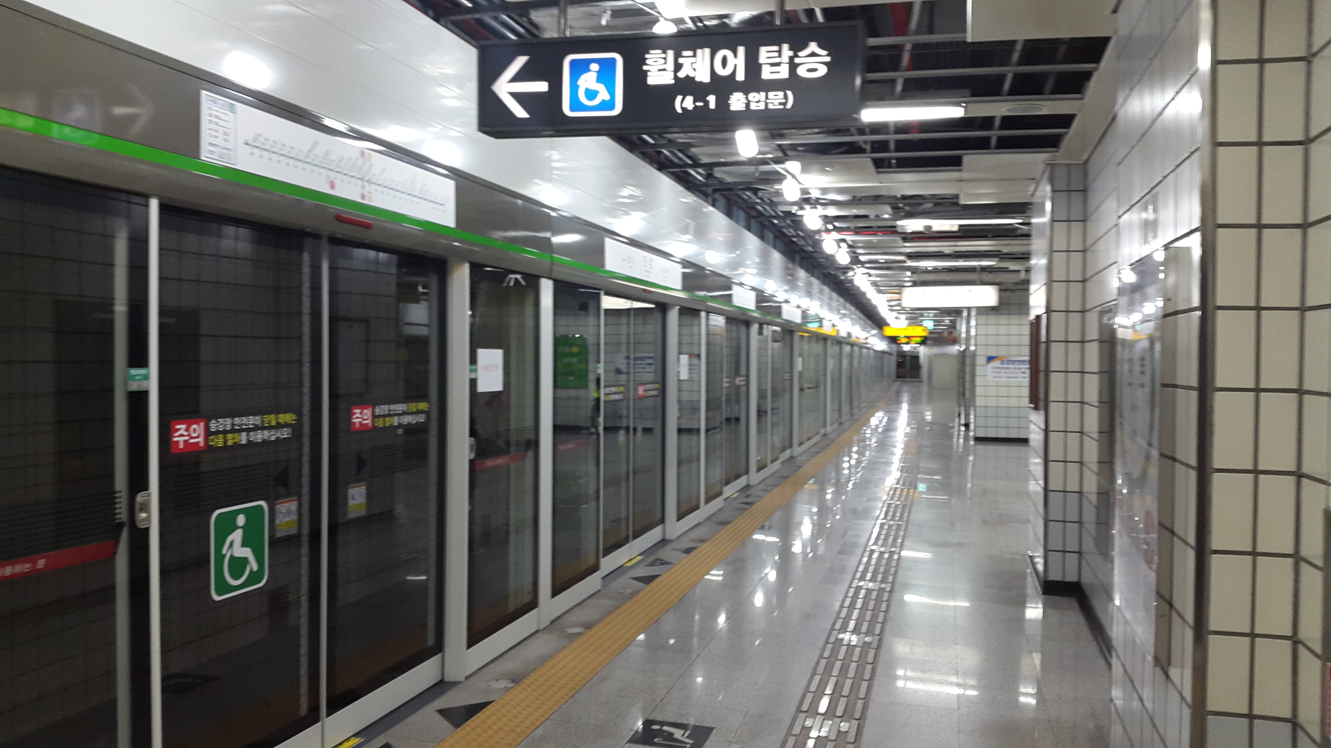 만촌역 승강장